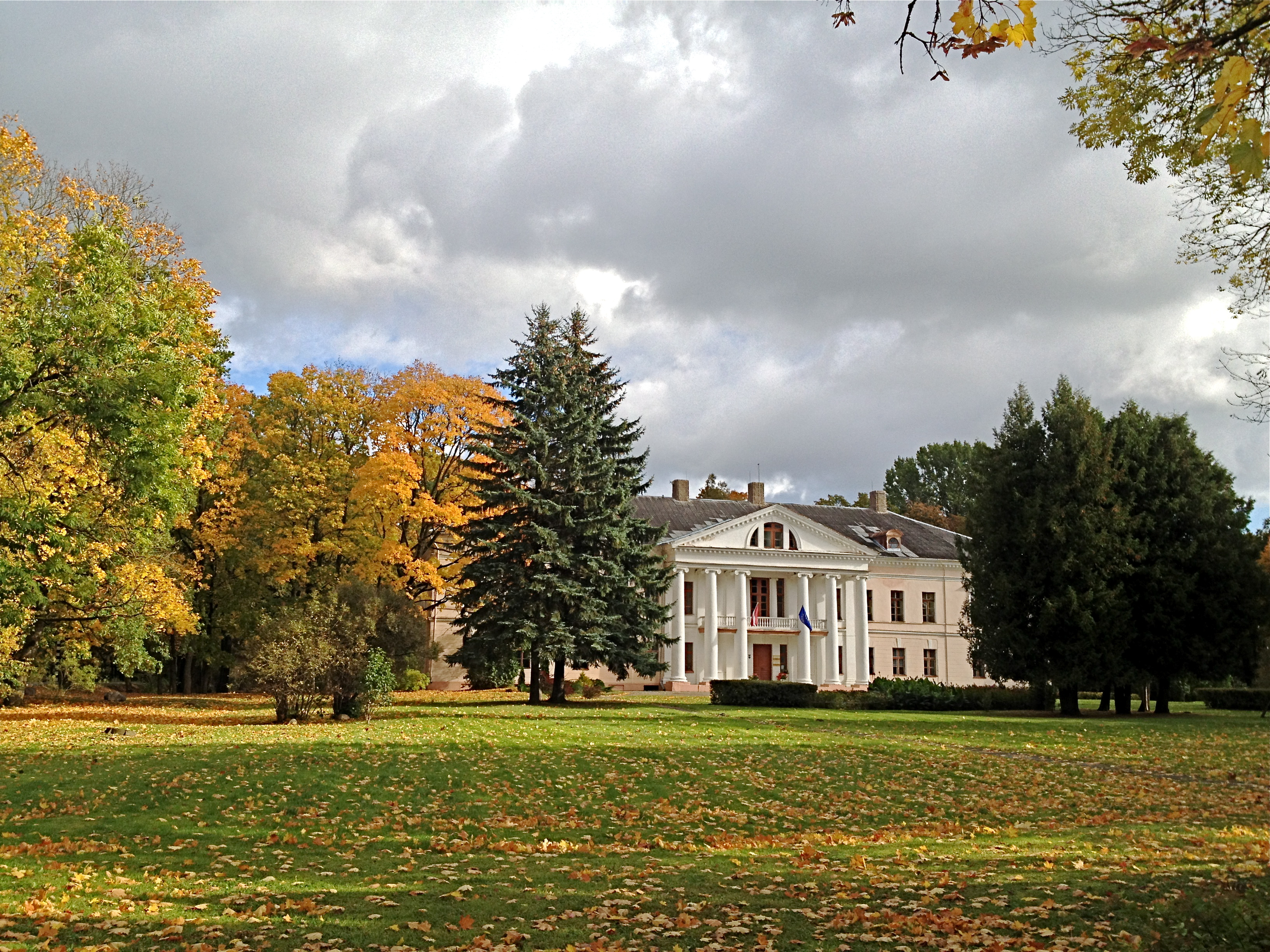 Borderland